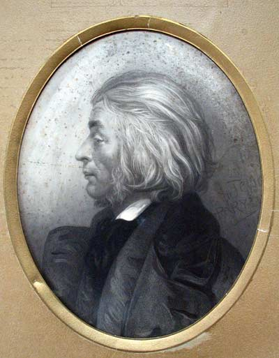 Franciszek Tepa. Portret A.Mickewicha